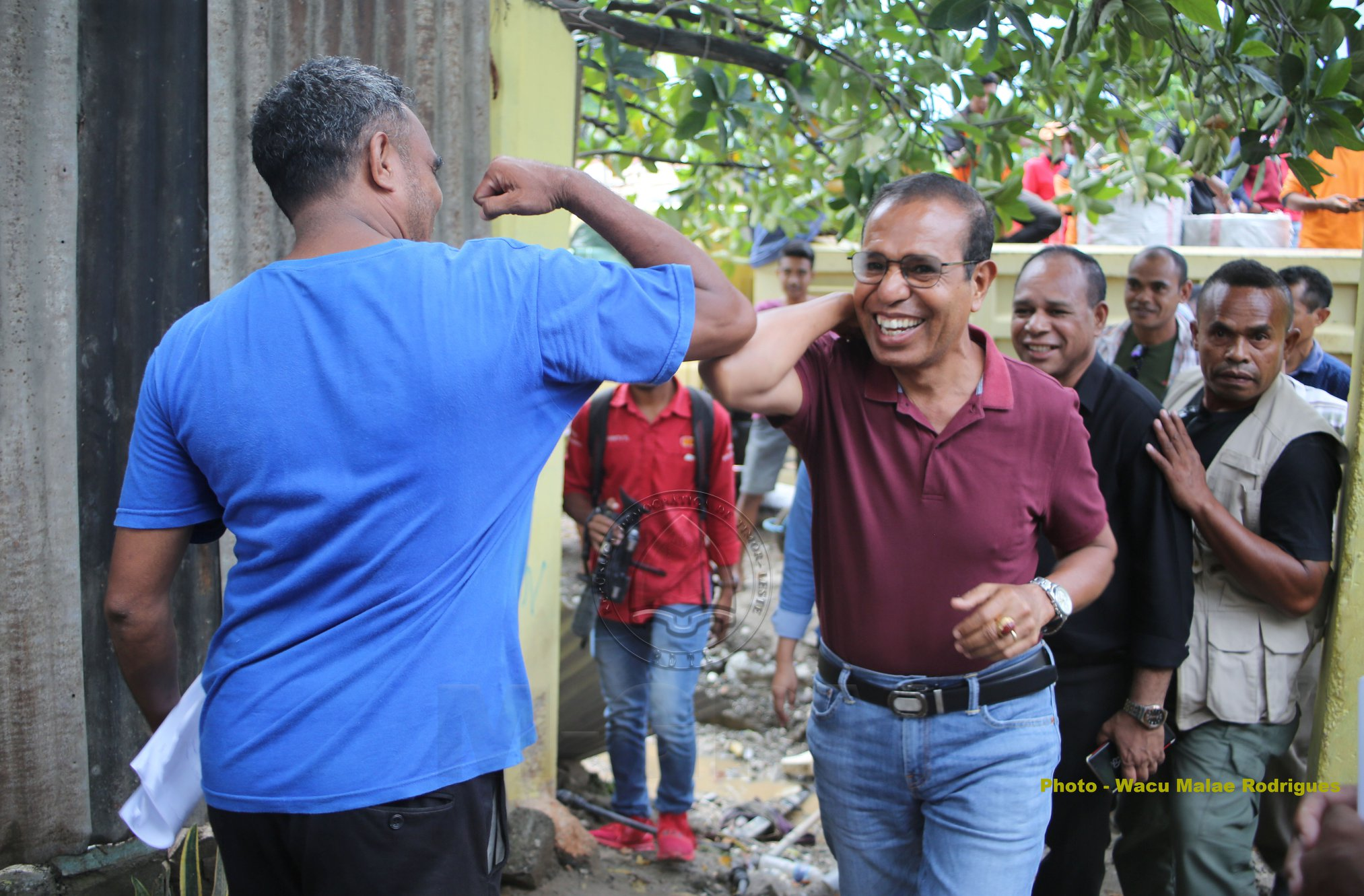 Taur Matan Ruak grüßt in Coronazeiten